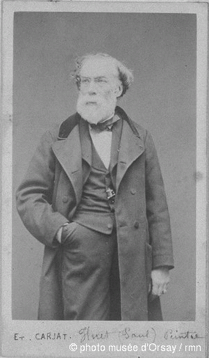 Paul Huet, hacia 1865, prueba sobre papel de albúmina de un negativo en vidrio, París, musée d'Orsay